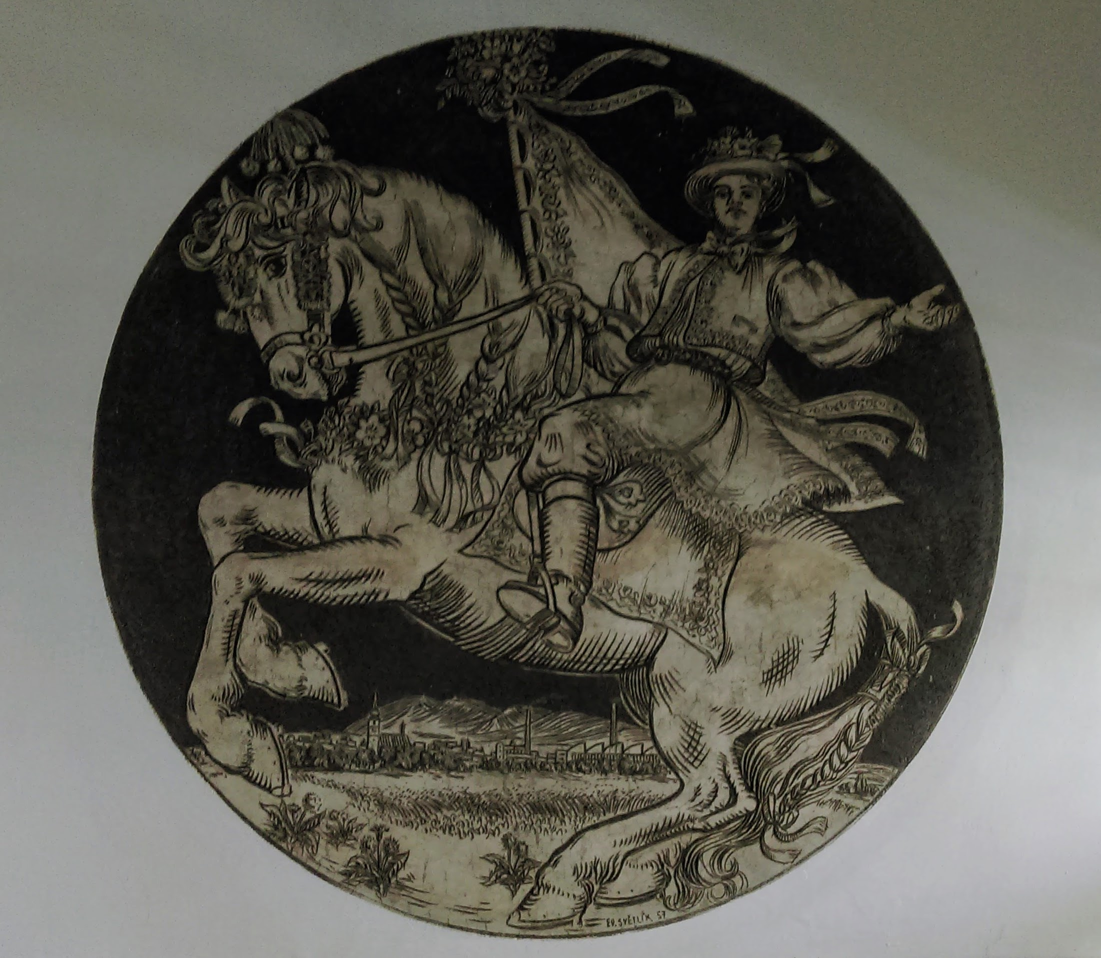 Sgrafito „Hanák na koni“ od Eduarda Světlíka z roku 1957 - Hulín schodiště nádražní budovy